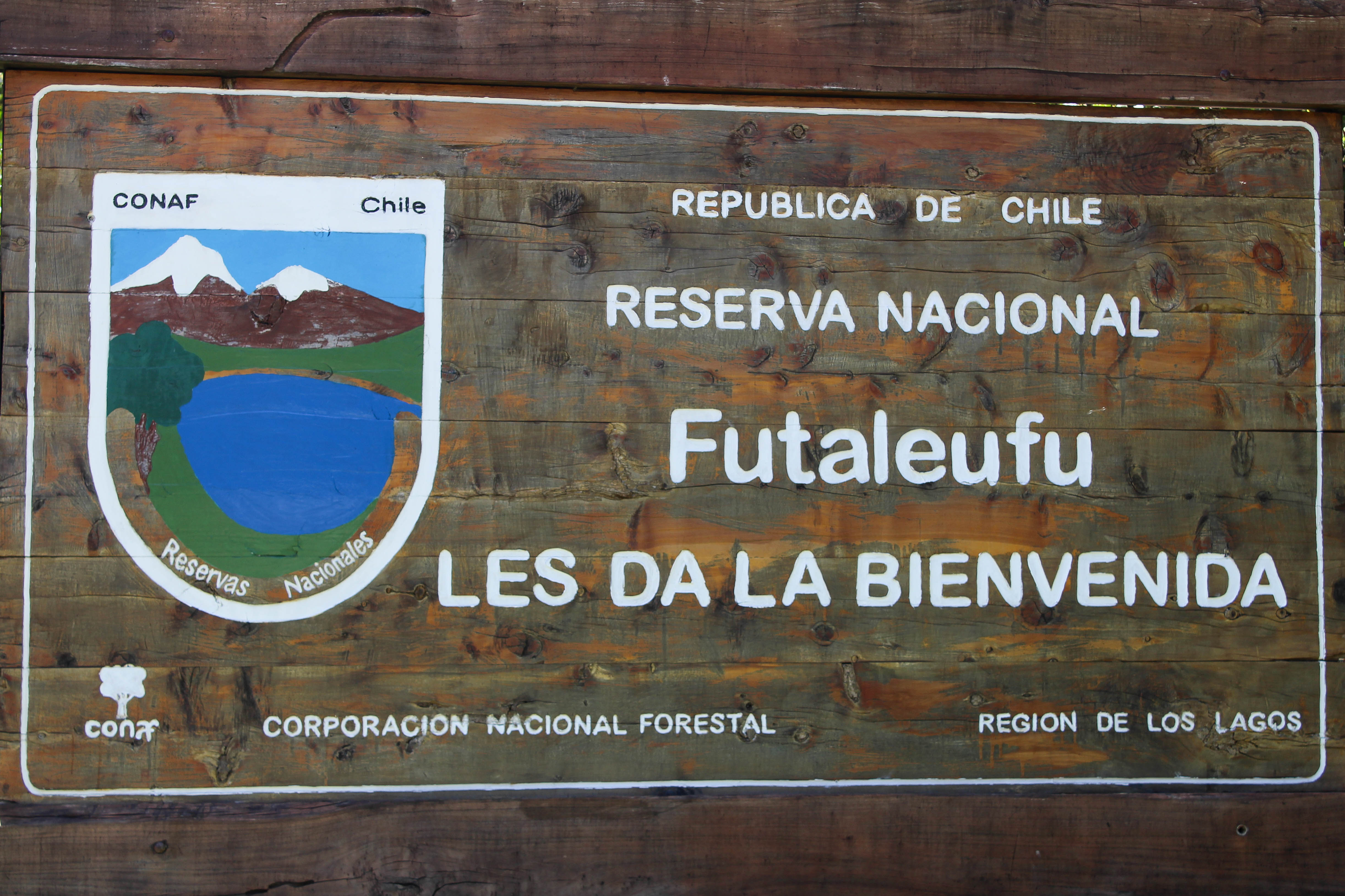 Reserva Nacional Futaleufú, Región de Los Lagos, Chile.